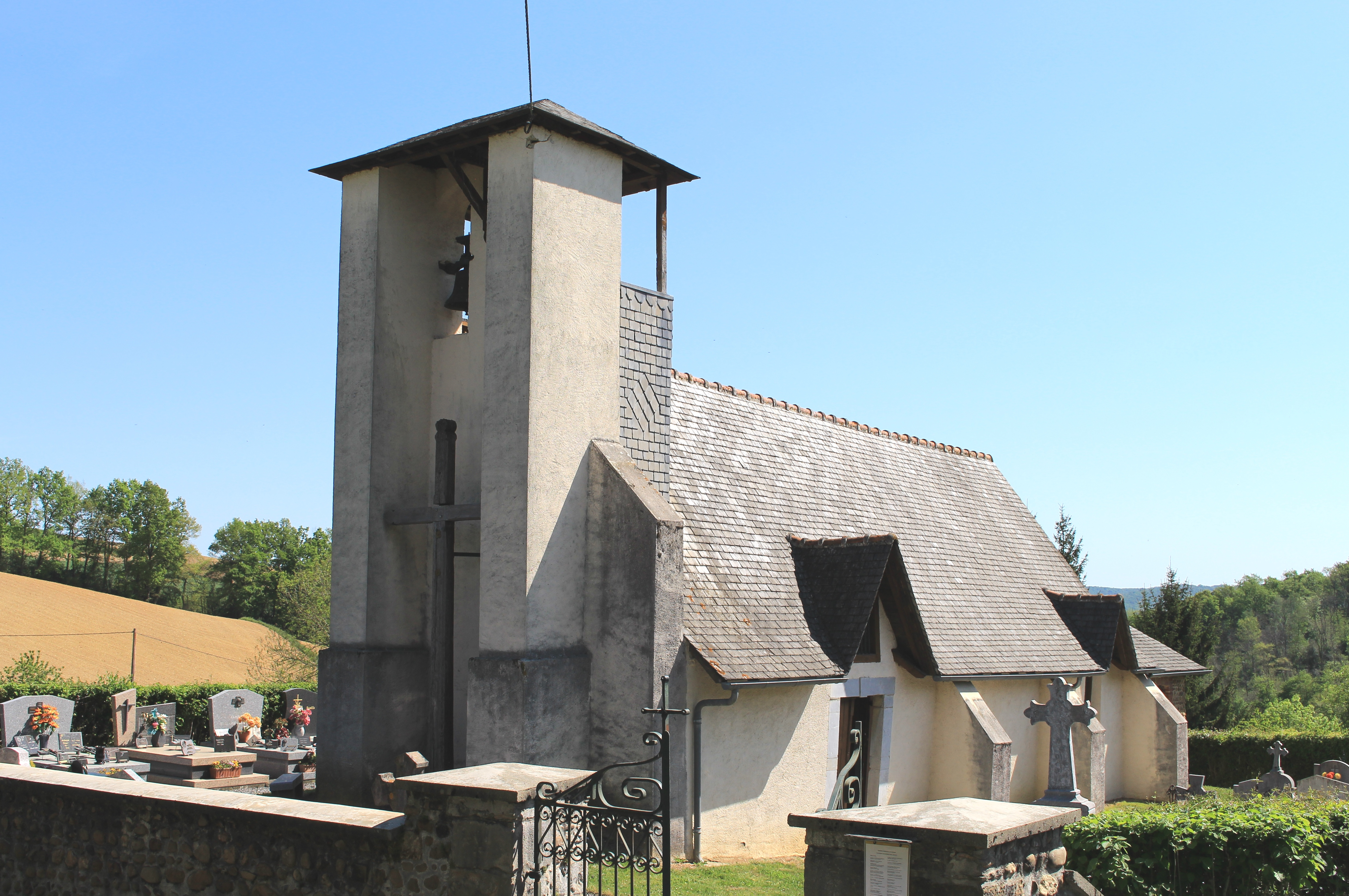 Église Saint-Pierre de Lhez (Hautes-Pyrénées)